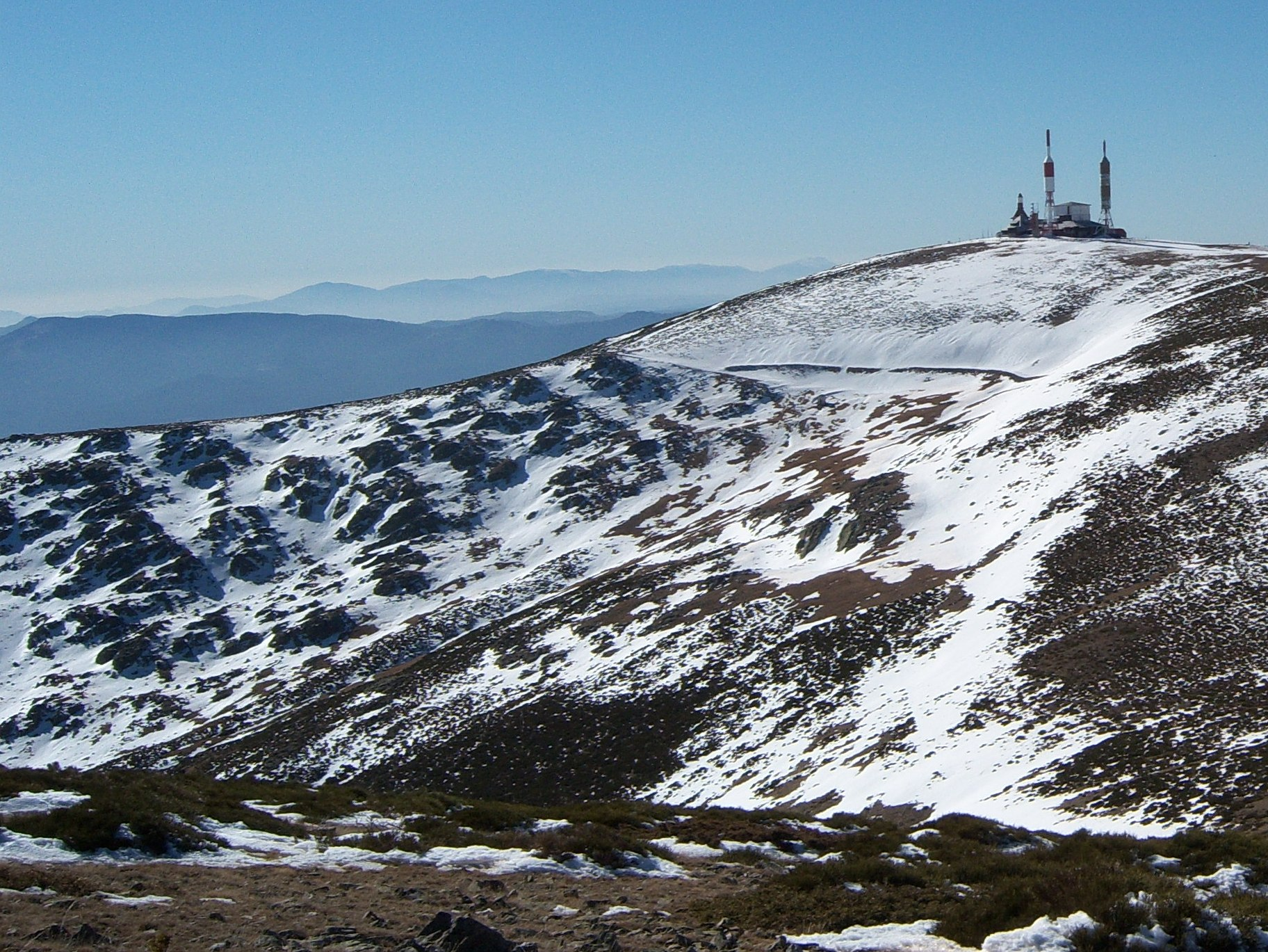 Ventisquero de la Condesa visto desde el Cerro de Valdemartín (Sierra de Guadarrama, España).